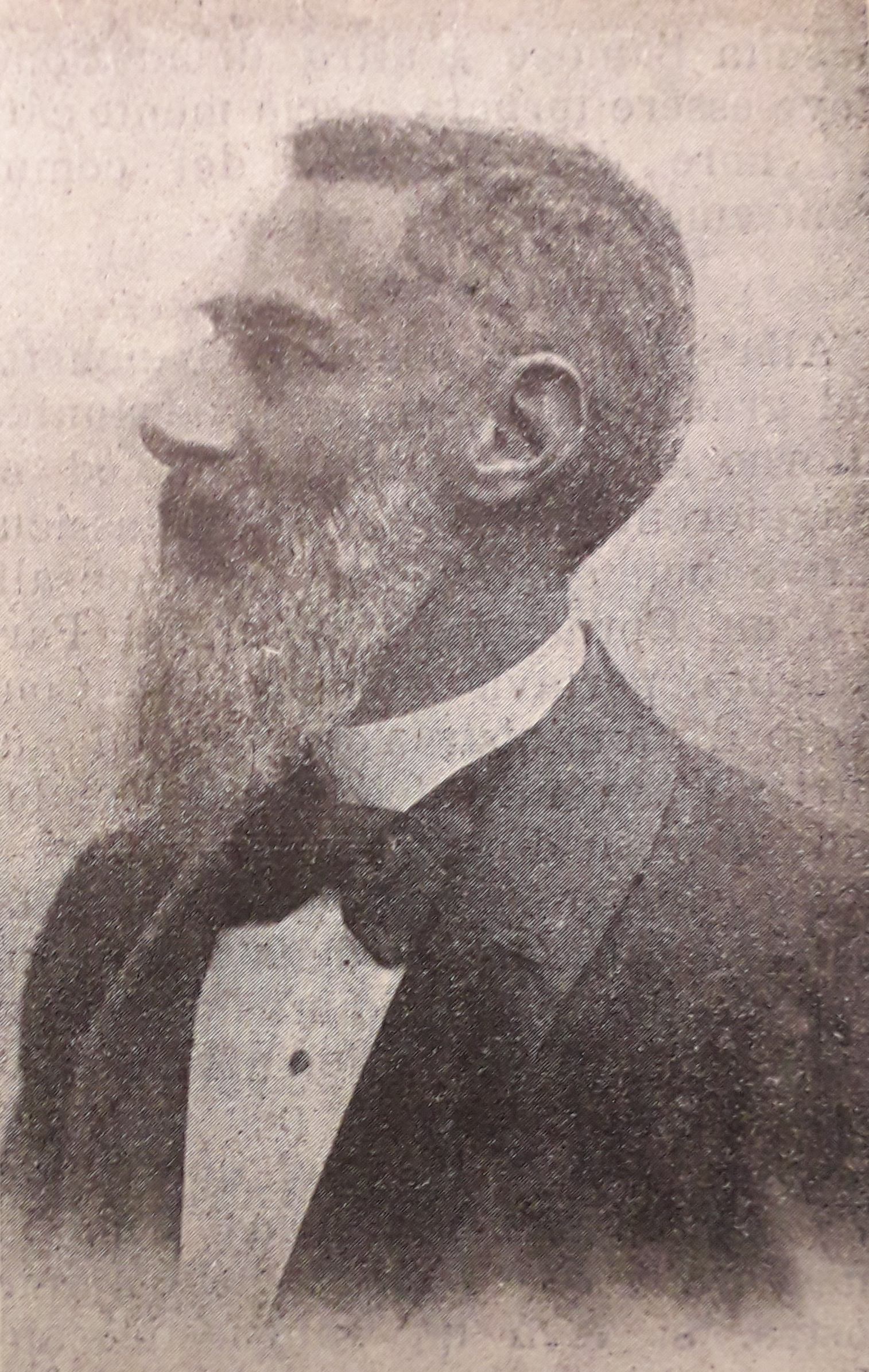 Il commendatore Pio Alessandro Pontremoli, direttore generale e fondatore dell'Anoima Grandine